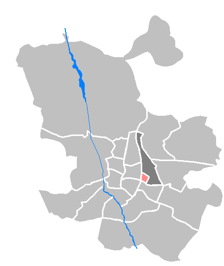 Map of La Elipa within Ciudad Lineal. Mapa de La Elipa dentro de Ciudad Lineal.